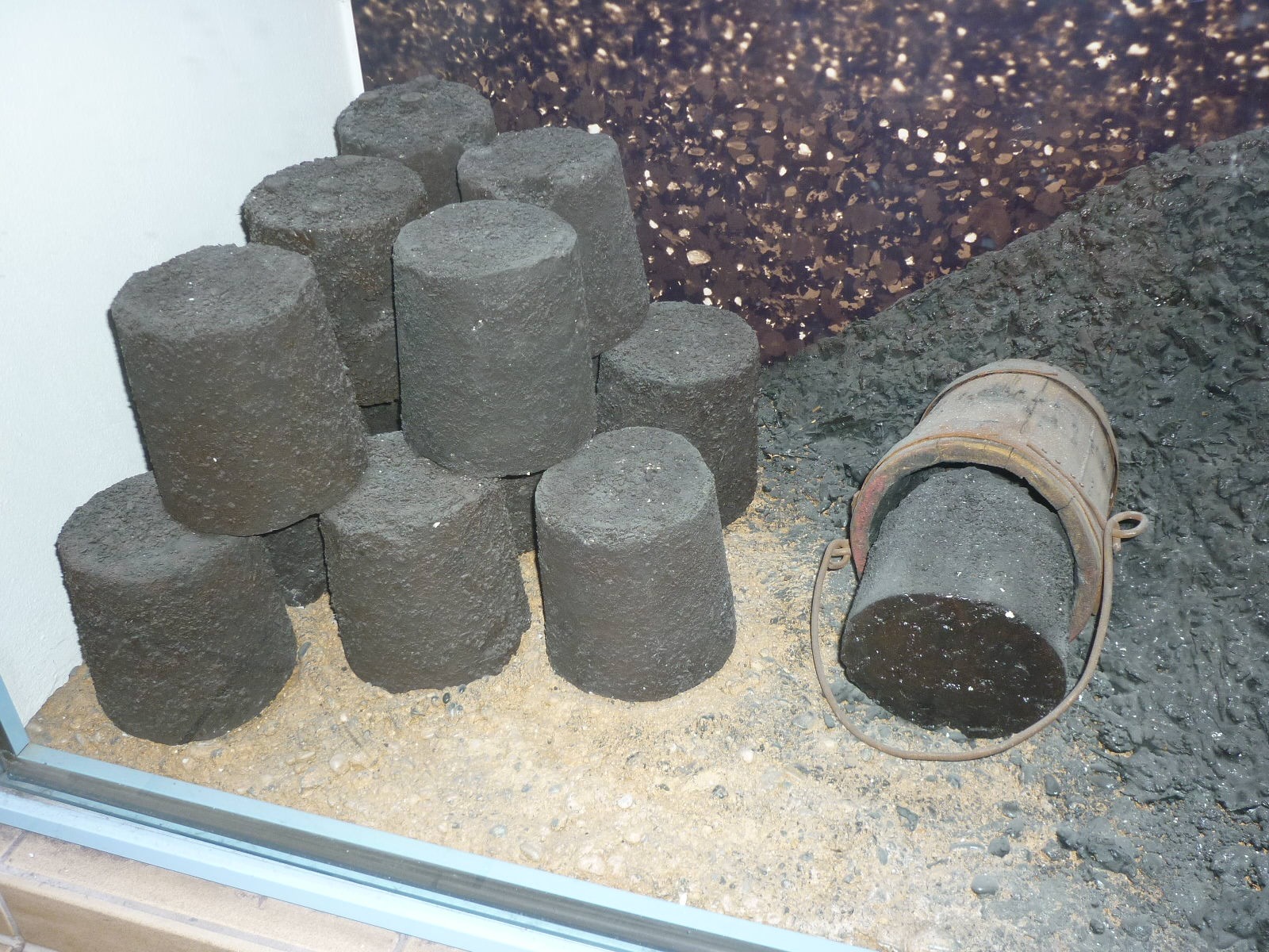 Herstellung von Klütten. Modell im Deutschen Museum München